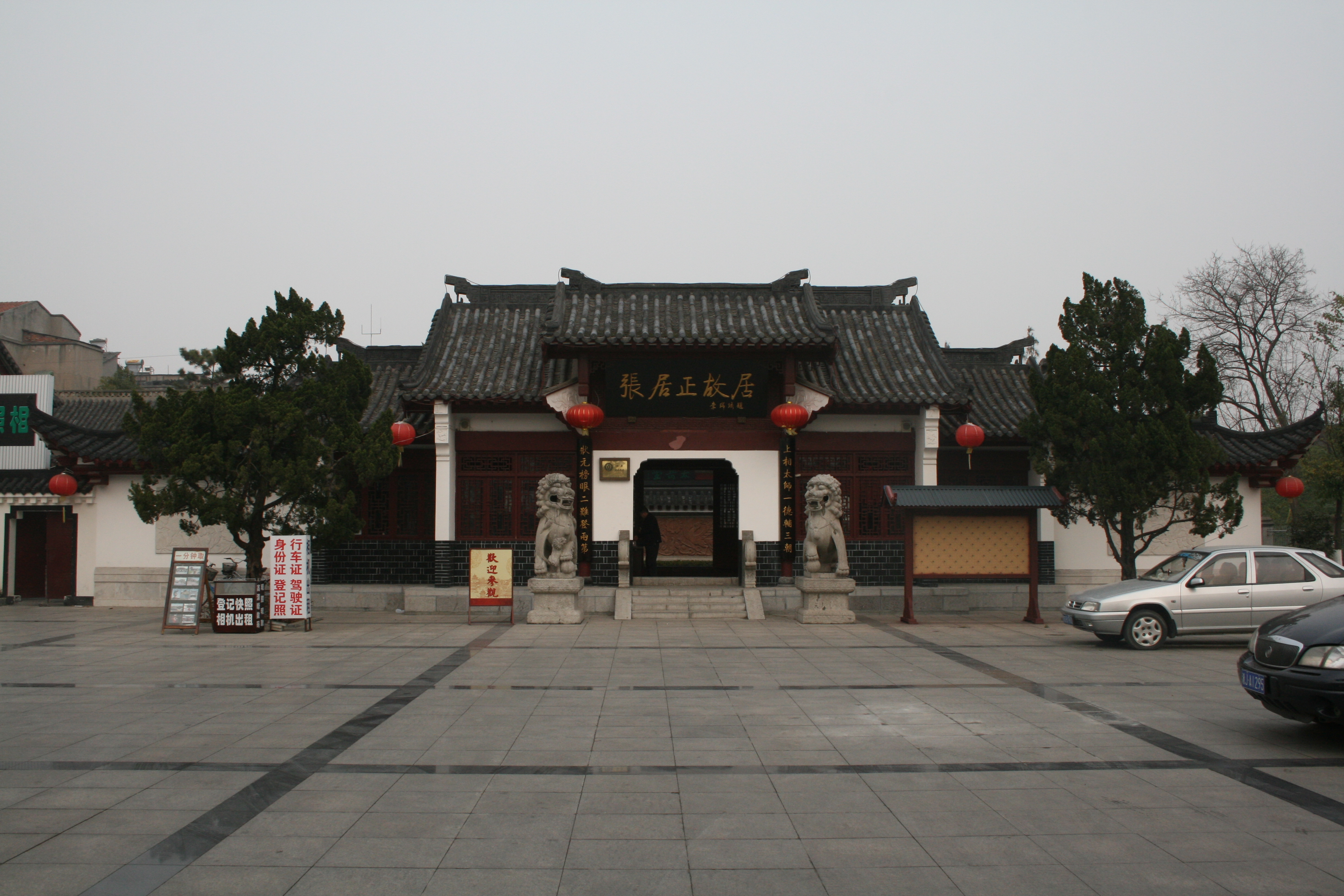 荆州张居正纪故居